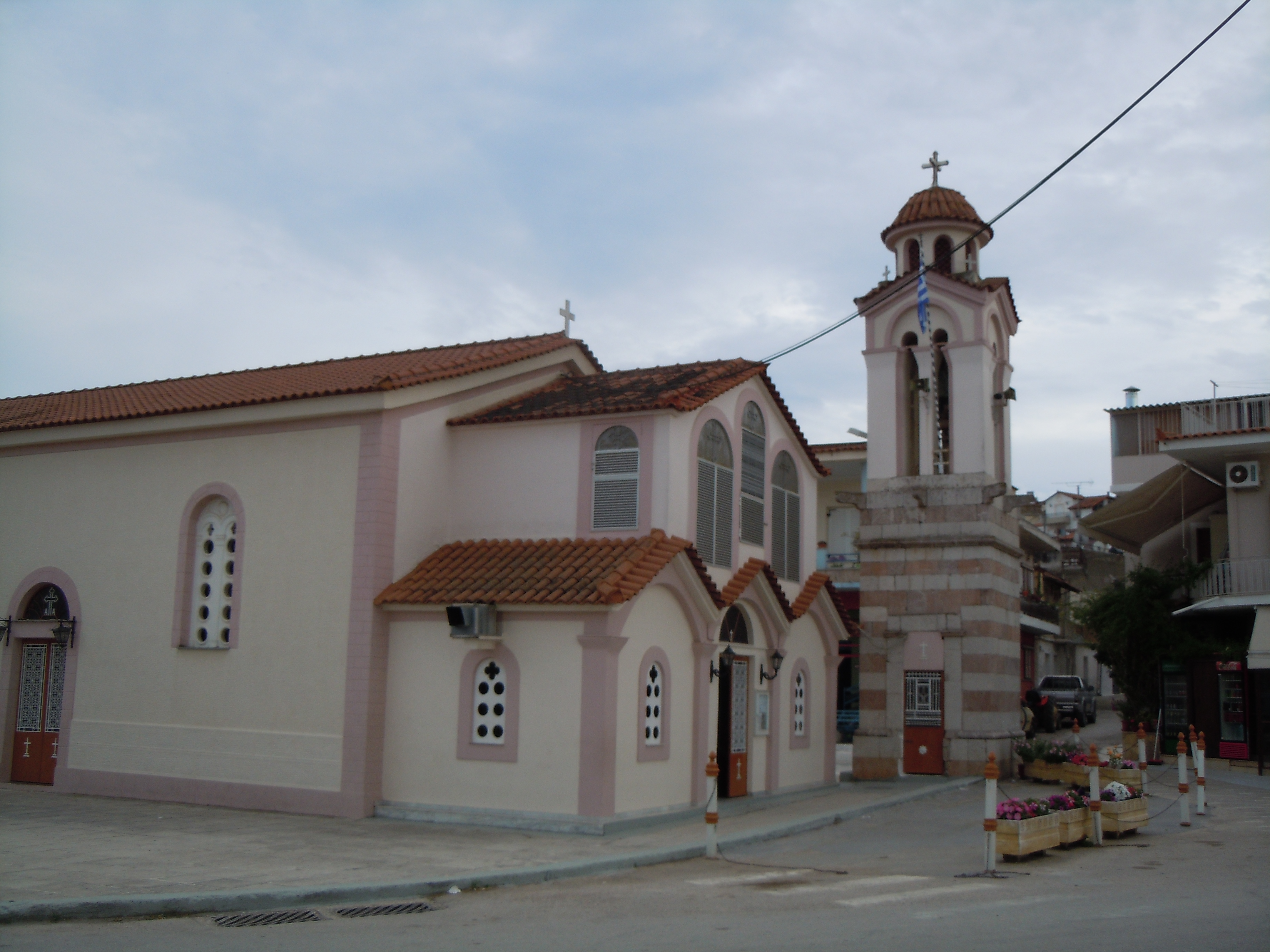 Eglise de Drepano